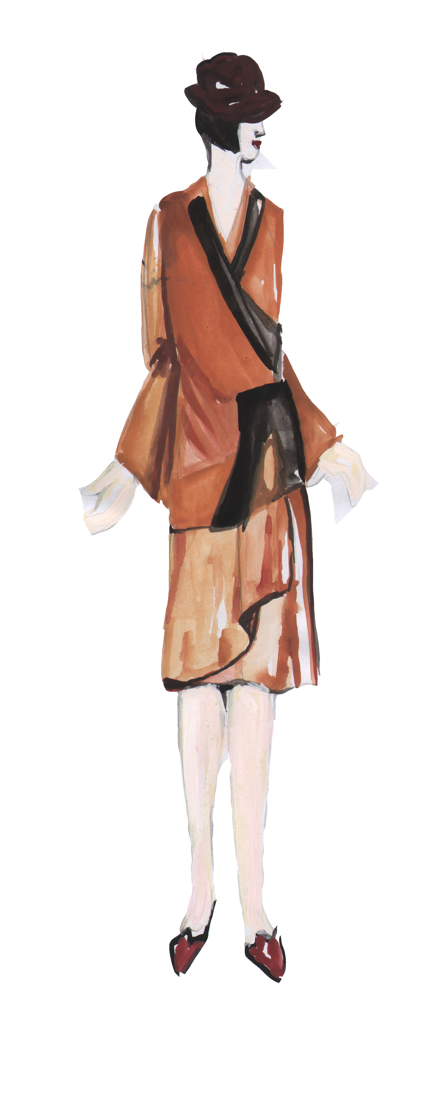 Dnevna toaleta 20-ih godina XX veka